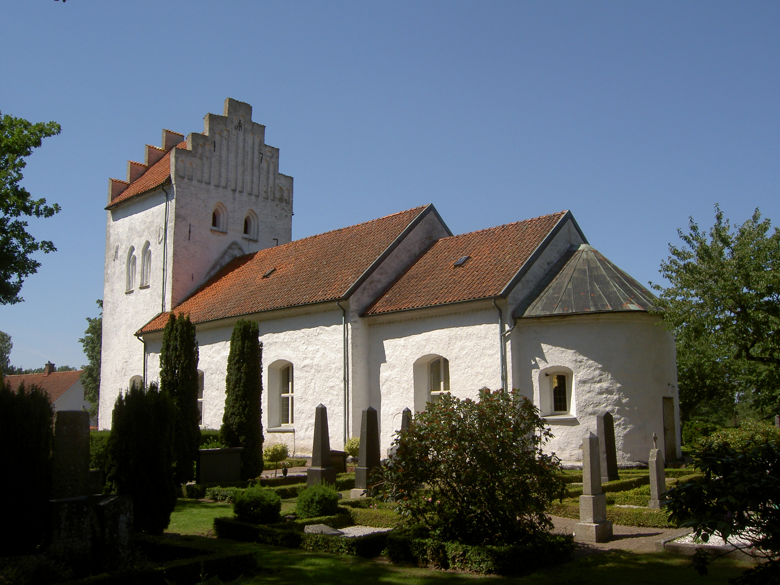 Farhults kyrka från sydost